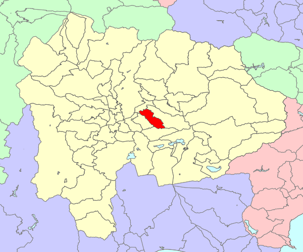 山梨県東八代郡八代町の位置画像。